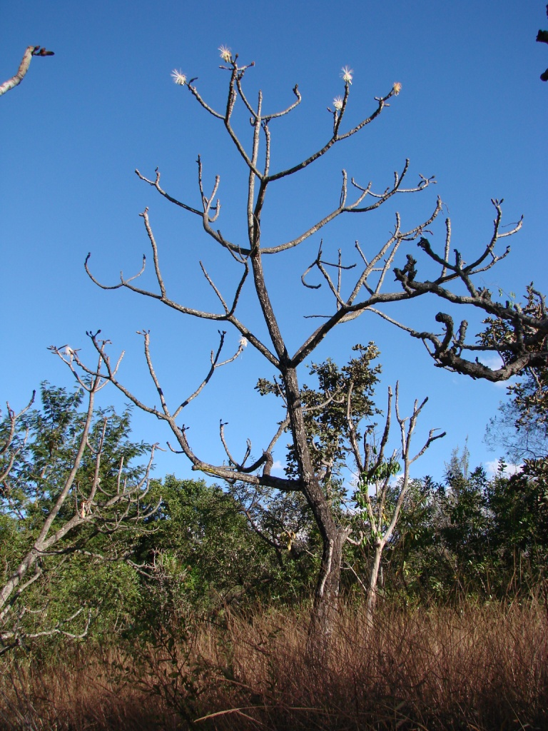 Pseudobombax longiflorum - MALVACEAE Parque Olhos D'Água - Brasília - Distrito Federal - Brasil.